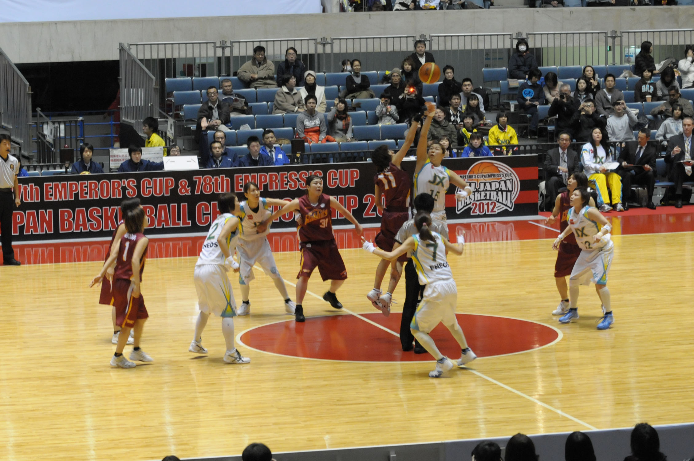 2012年全日本総合バスケットボール選手権大会3回戦、JXサンフラワーズ対トヨタ紡織サンシャインラビッツ。代々木第一体育館で。